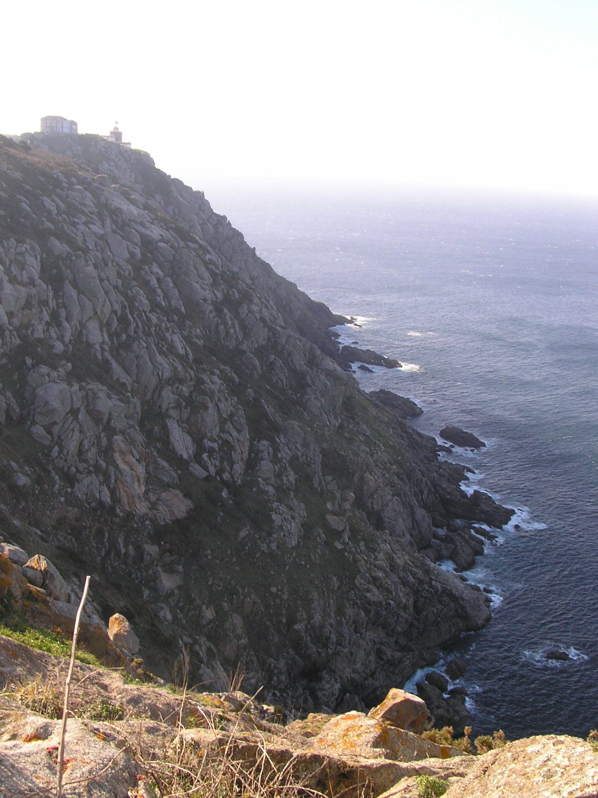 Vista do Cabo Fisterra en febreiro. O Cabo Fisterra está situado na provincia de Coruña, na Galiza (España).